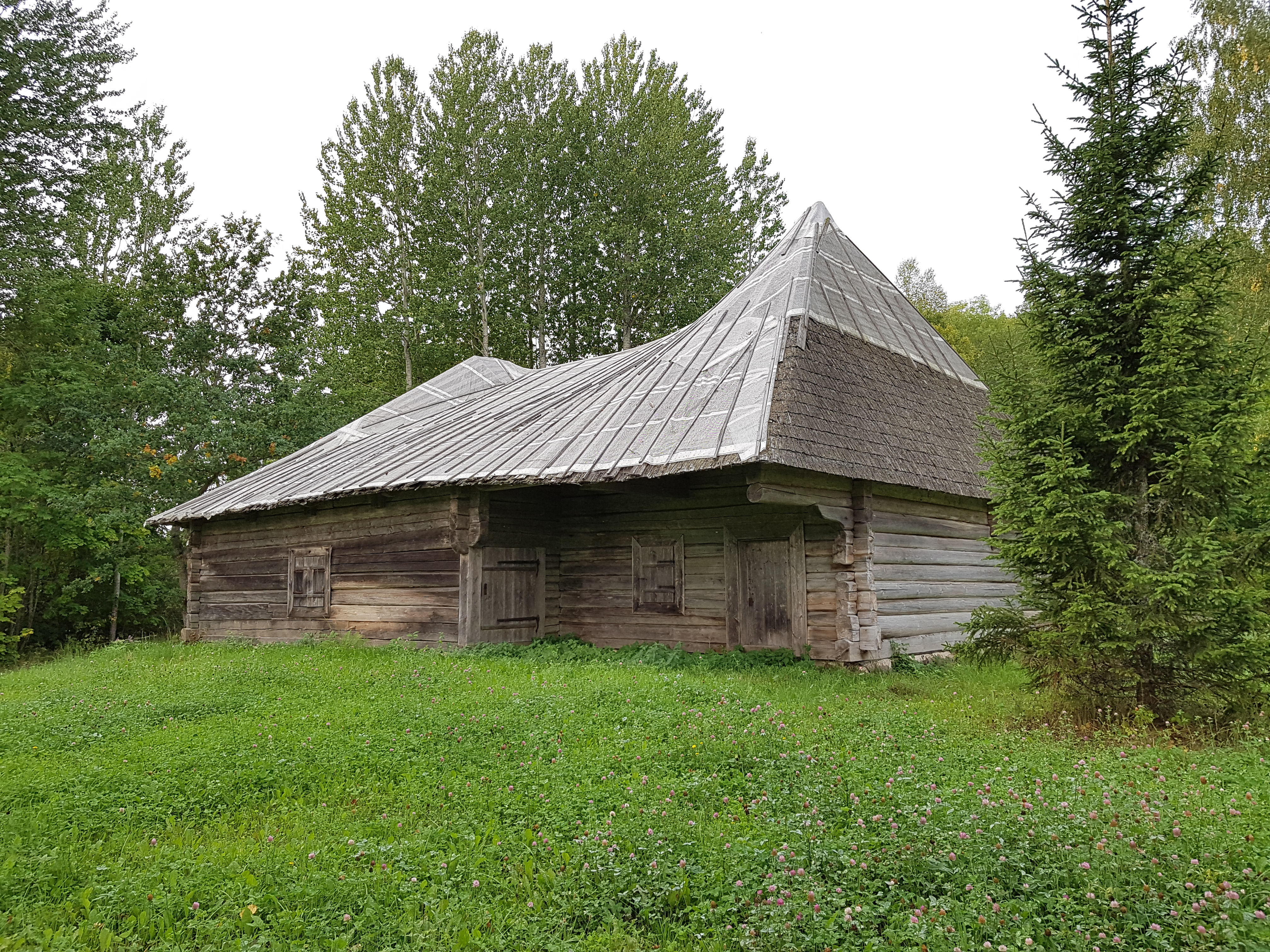 Saiešanas nams "Cepļos", Vecpiebalgas pagasts